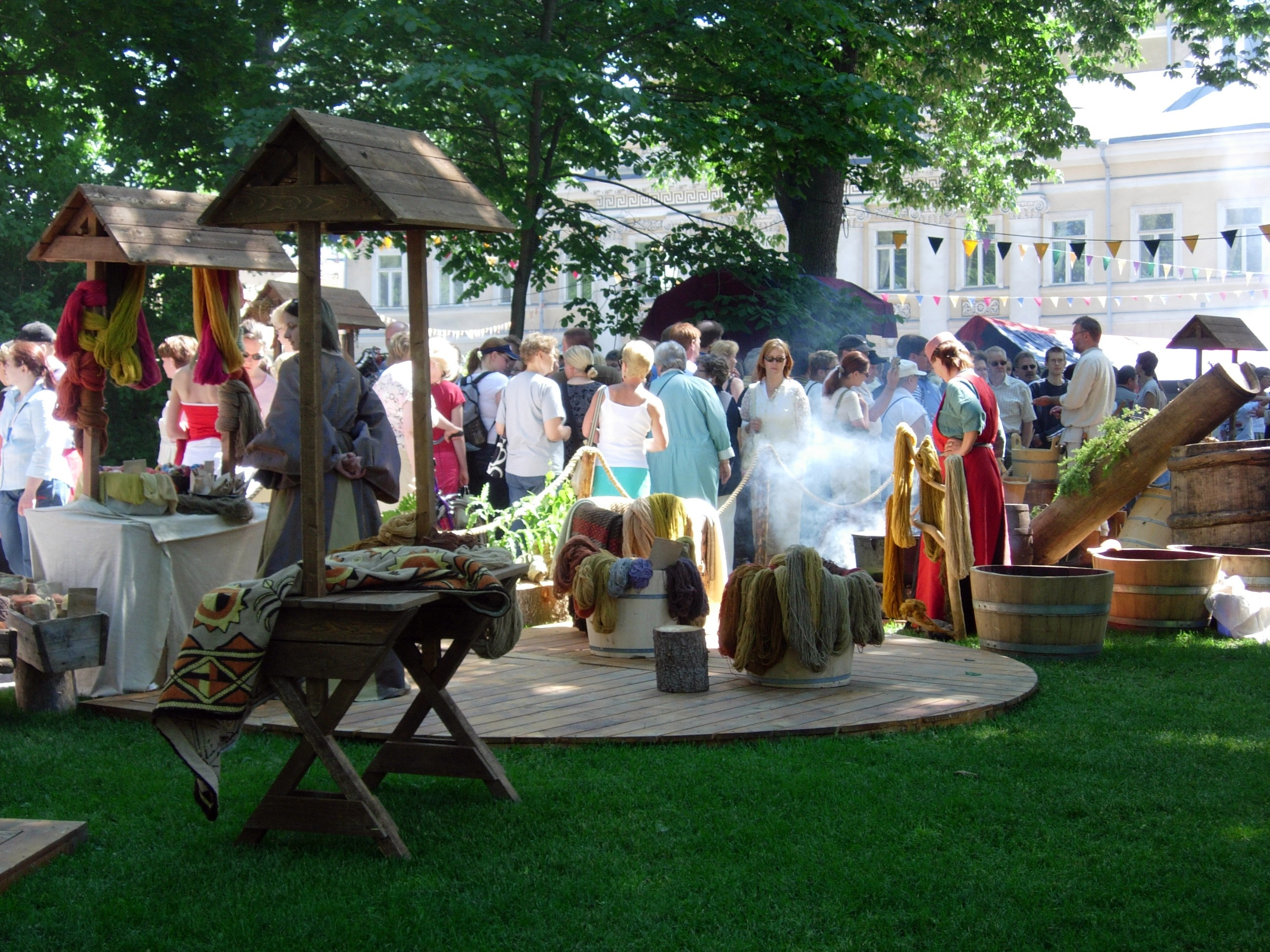 Turku Medieval Market 2005 - Dyeing wool.